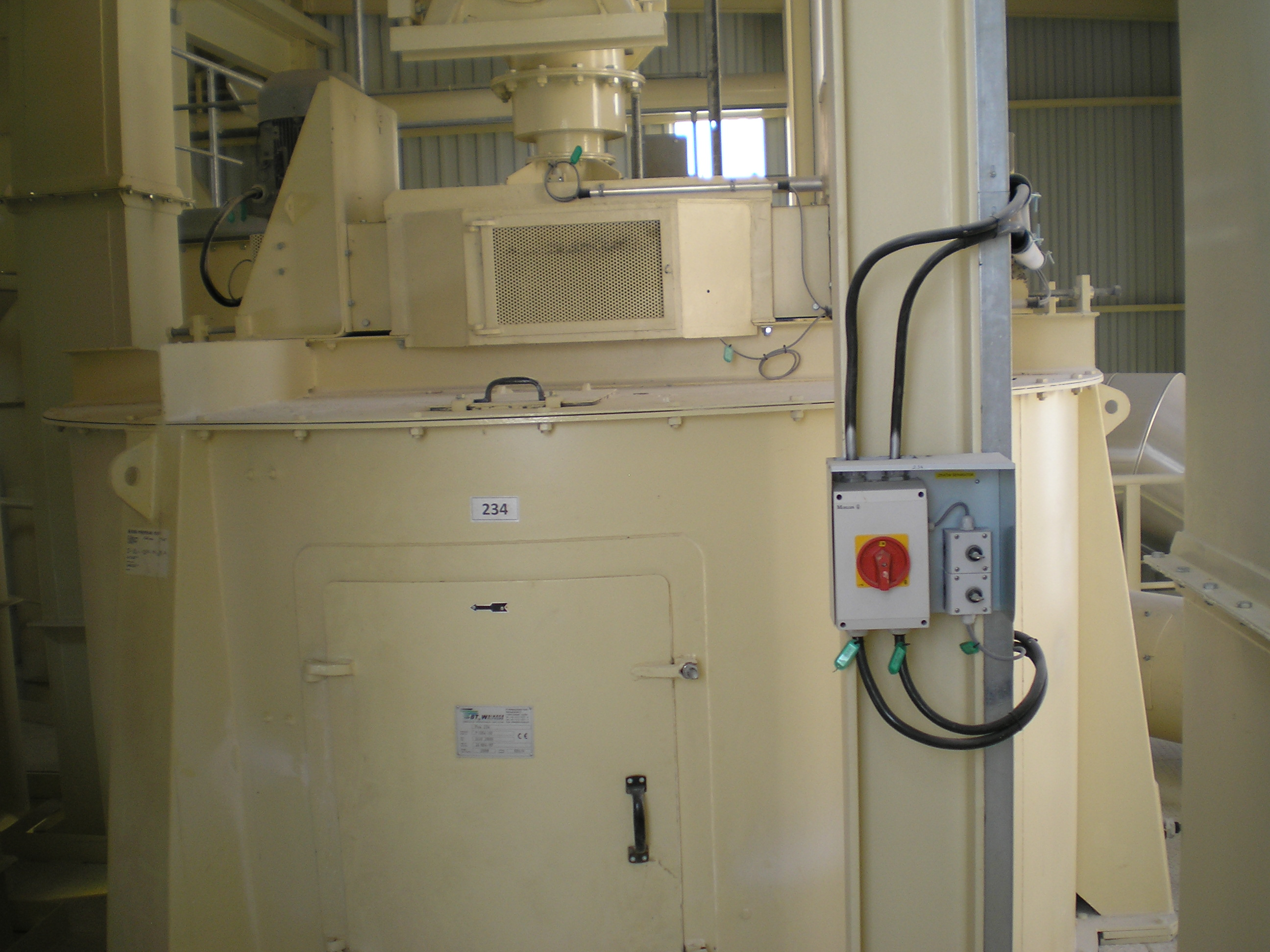 Glavno stikalo stroja za mletje peska nezaščiteno pred neželenim ponovnim vklopom.